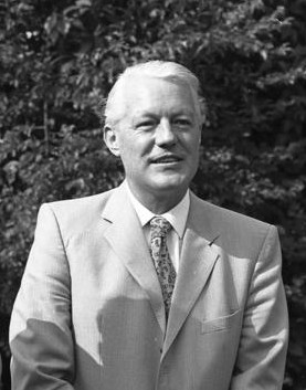 Konferenz der Ministerpräsidenten der CDU/CSU-regierten Länder in der Landesvertretung Niedersachsen, Bonn. Thema: Sparprogramm der Bundesregierung